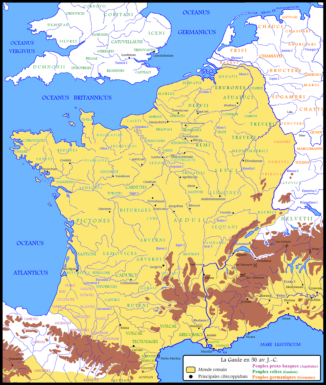 La Gaule en 50 av. J.-C.